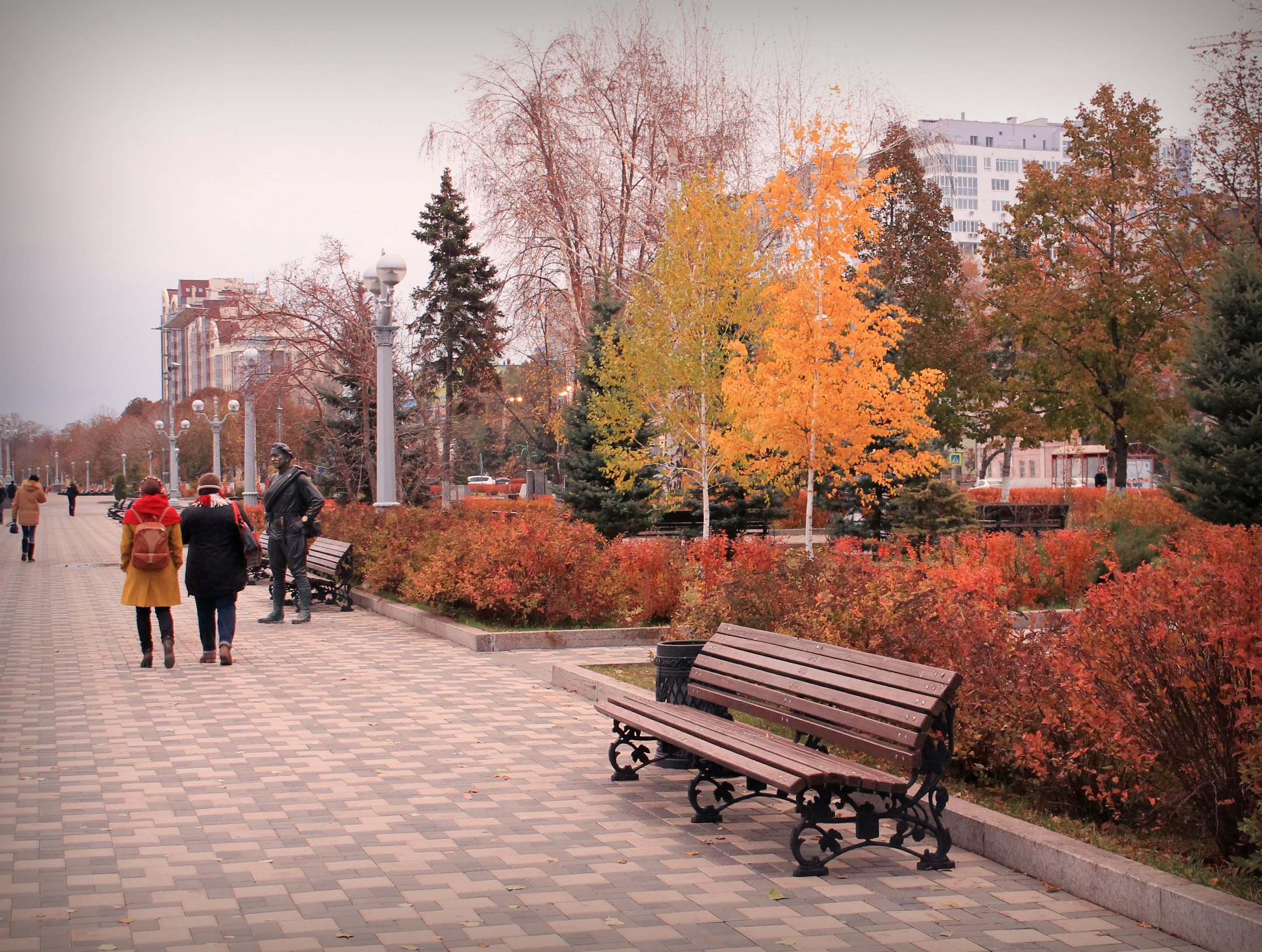 Третья очередь набережной в начале ноября 2015 года